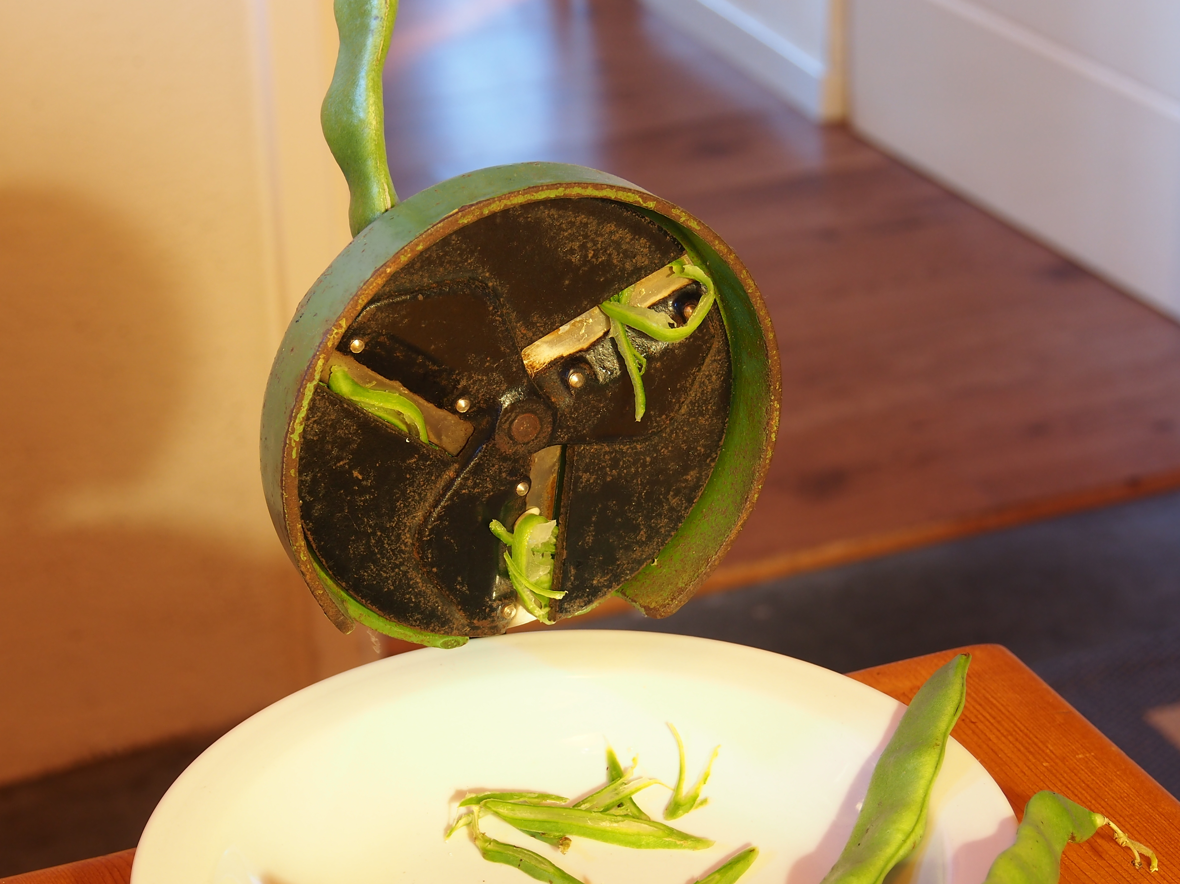 PeDe Snijboon snijmachine.